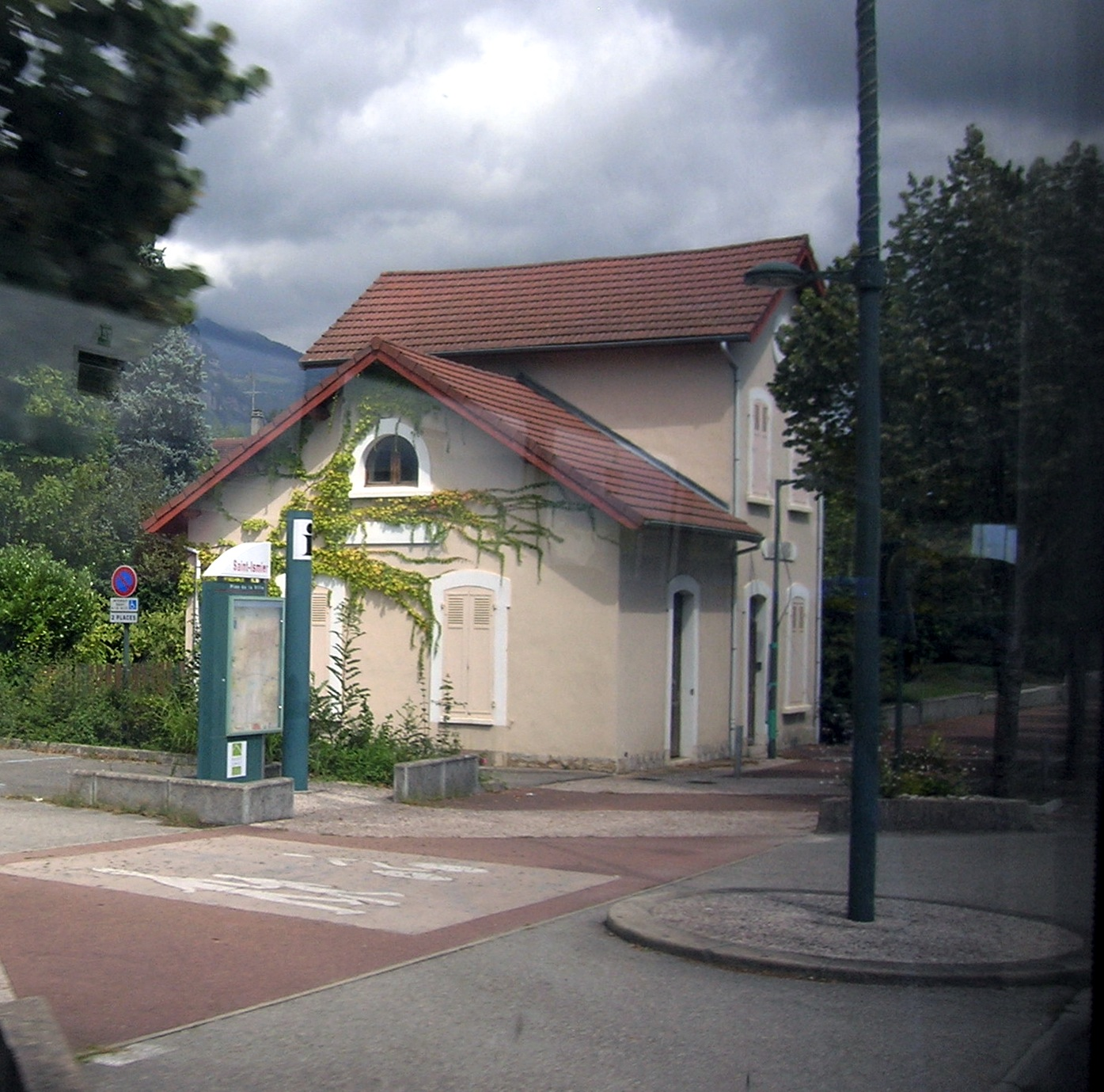 Ancienne gare de Saint-Ismier, Isère, AuRA, France.